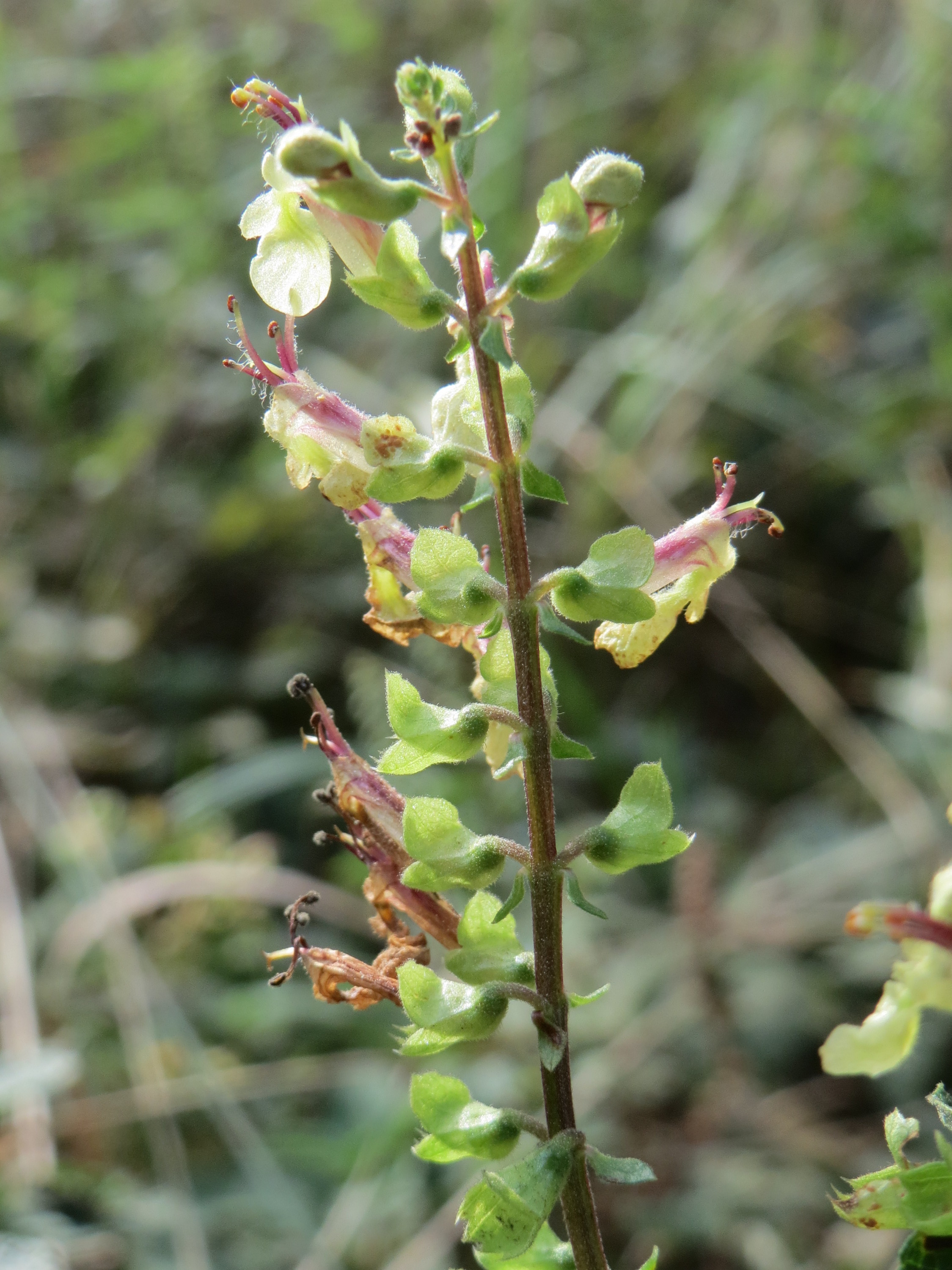 Salbei-Gamander (Teucrium scorodonia) auf dem Saupferchbuckel im Schwetzinger Hardt